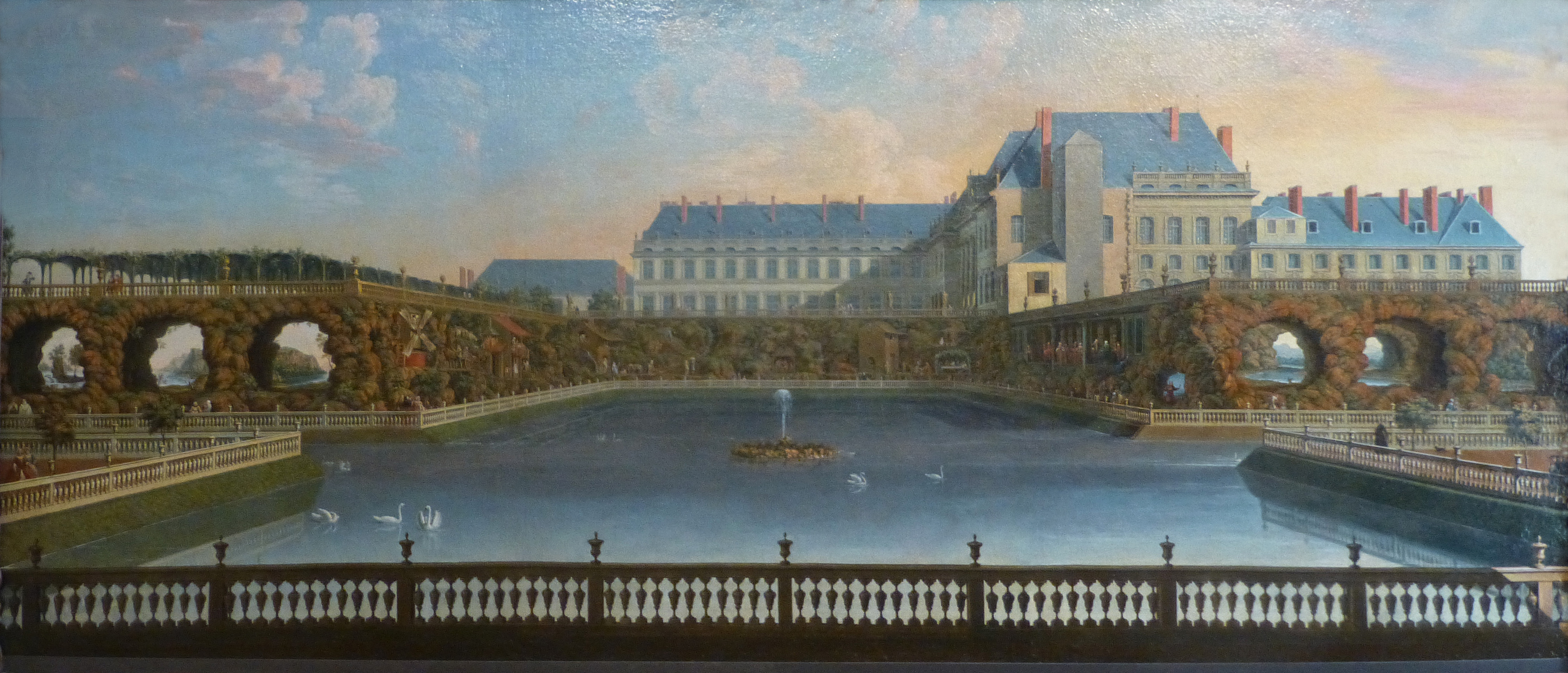 André Joly (1706-après 1781). Le château de Lunéville, vue du Rocher, Vers 1760. Musée Lorrain, Nancy